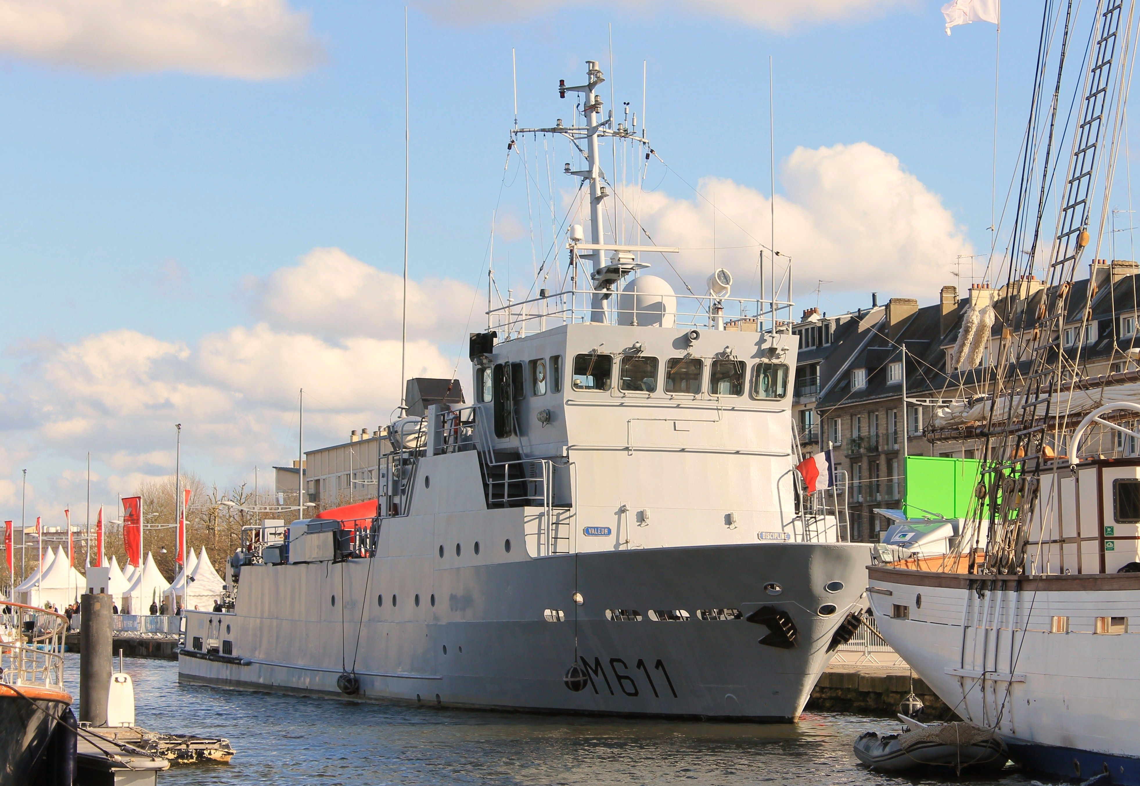 Le Vulcain (M611) bâtiment-base de plongeurs démineurs à Caen à l'occasion de la "Normandy Channel Race 2013"